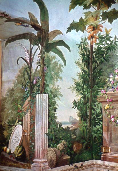 Illusionistische Landschaften mit exotischen Tieren und Pflanzen (Wanddekoration, Deckendekoration)